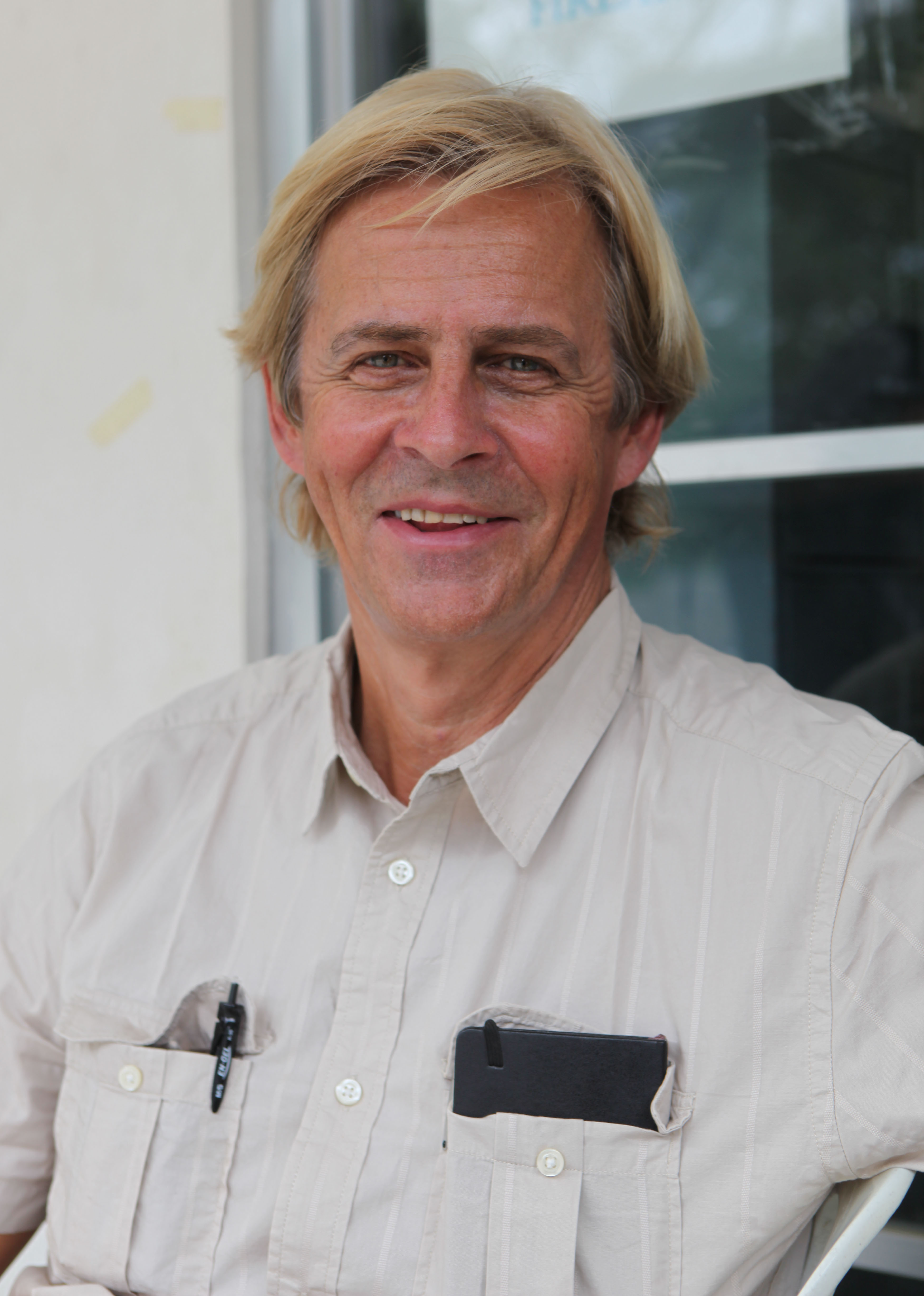 Anders Magnus, Journalist og forfatter, 2011.